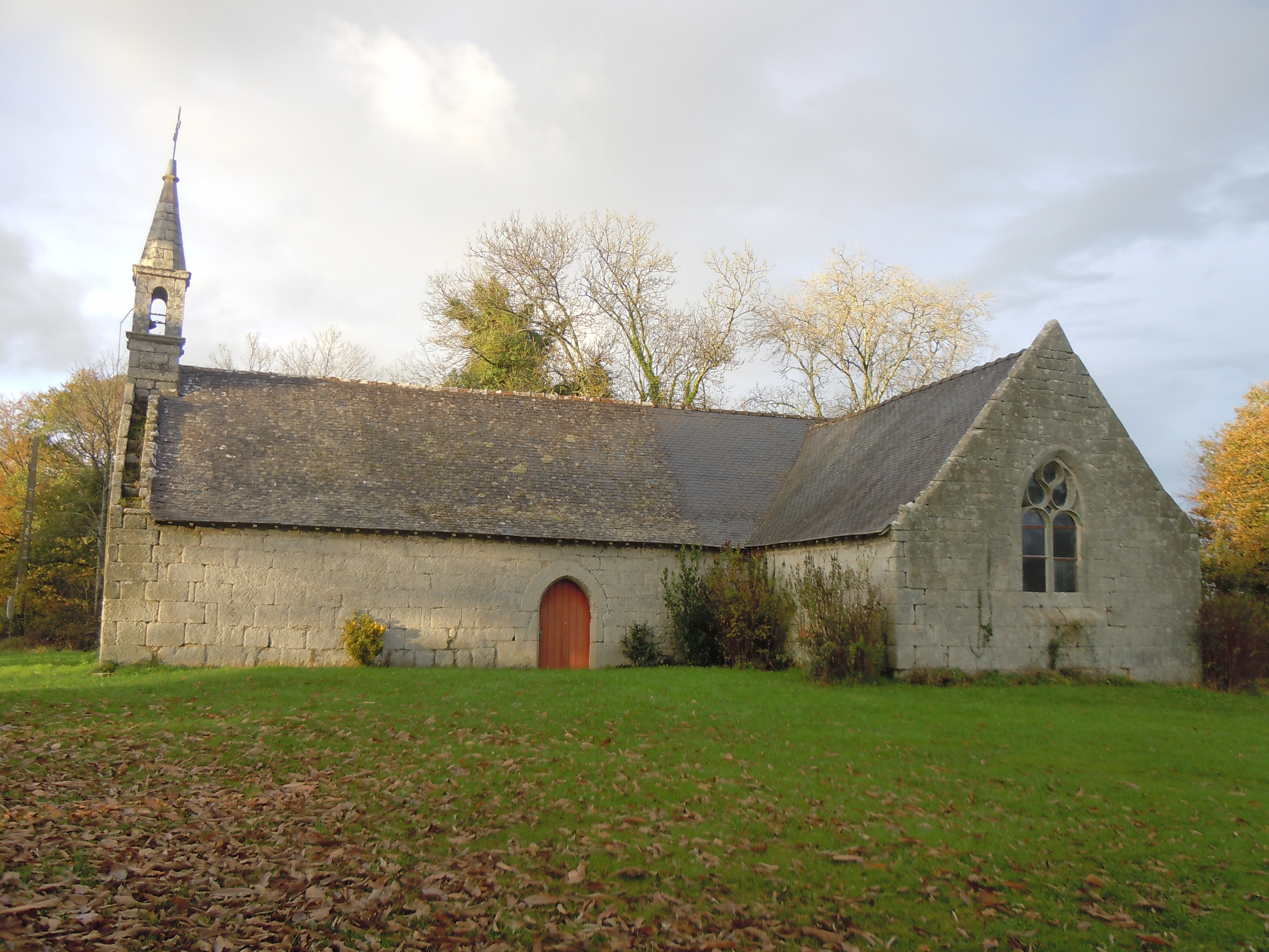 vue prise du sud de la chapelle Saint Jean du Faouët (département du Morbihan) - Google Maps - Google Earth